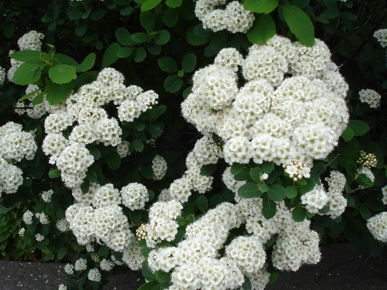 Spiraea betulifolia